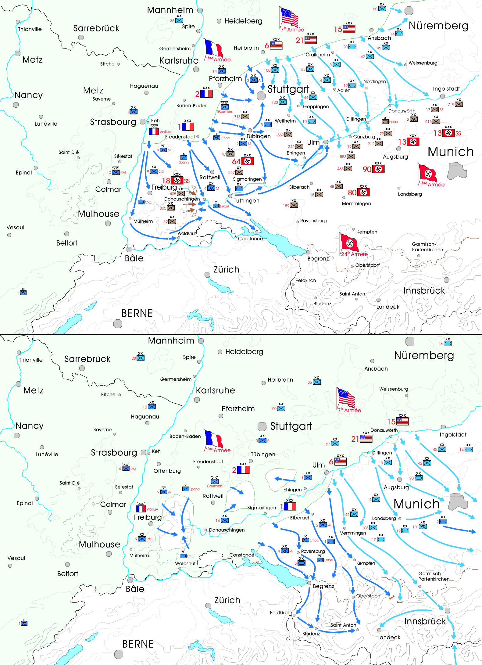 Rhin et Danube : tronçonnage de la 19è Armée allemande, prises de Stuttgart et Ulm, entrée en Autriche, 18 avril - 07 mai 1945